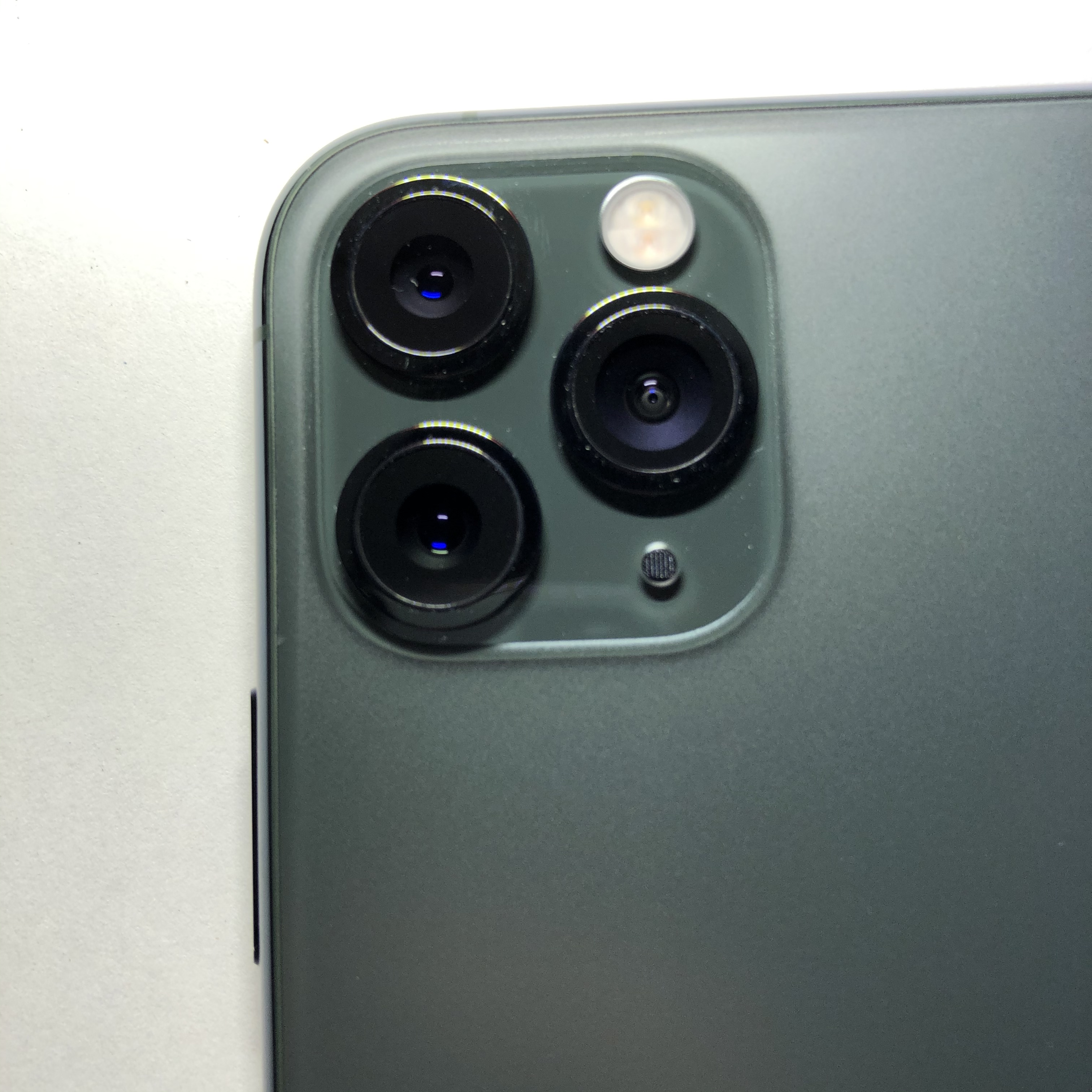 iPhone 11 pro のカメラ